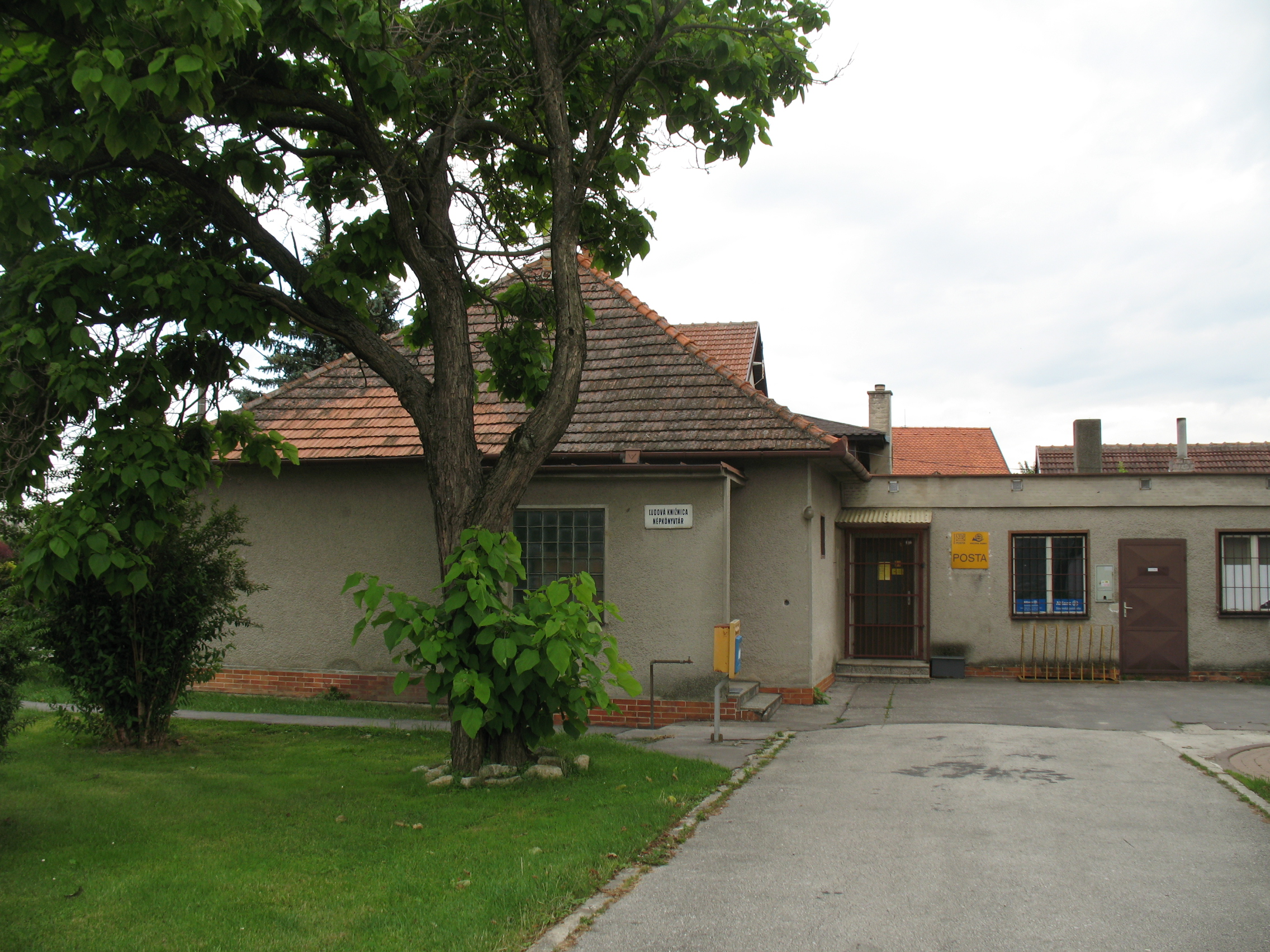 Hegysúr